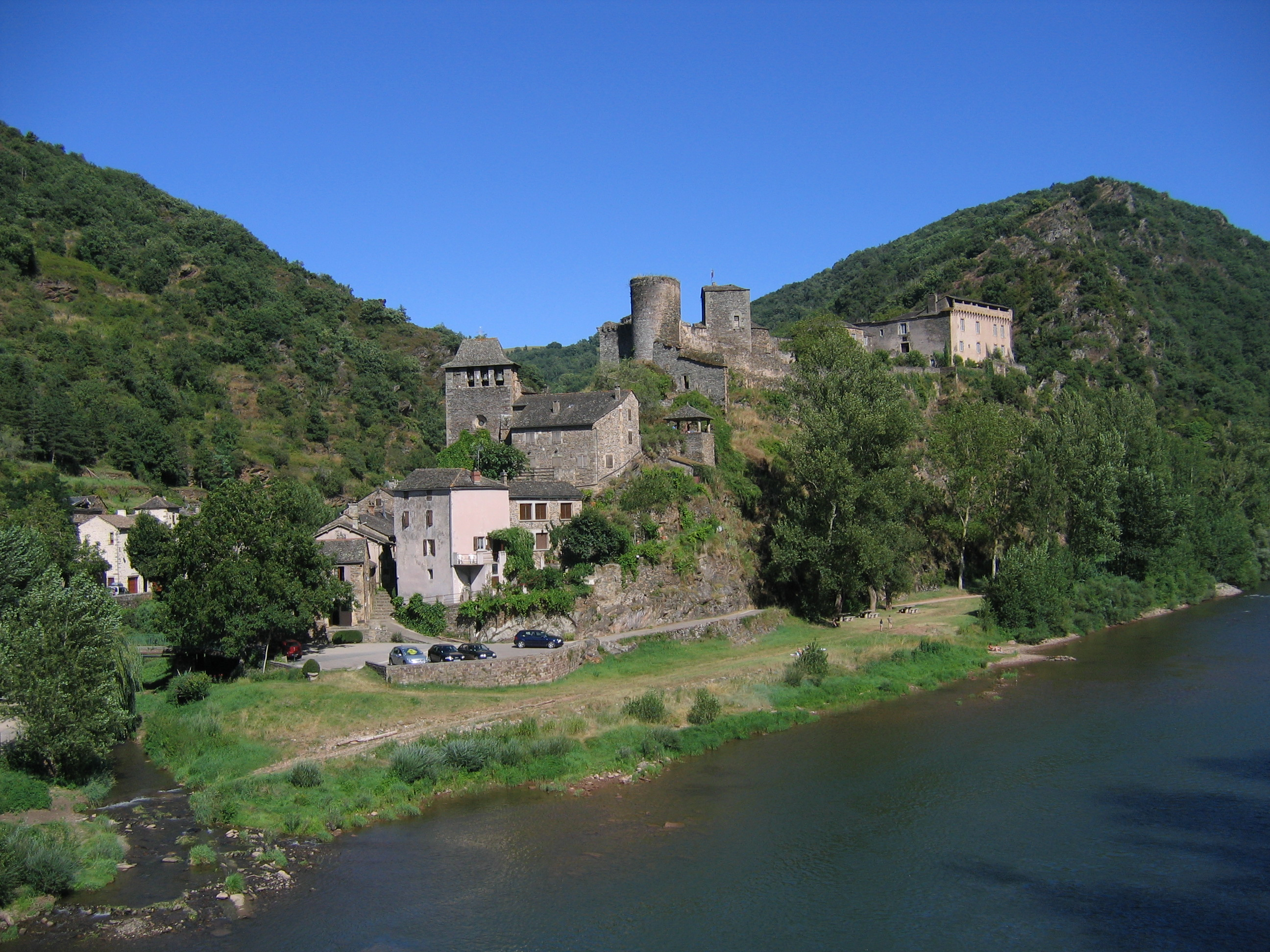 Vue générale du village au bord du Tarn. Photo Christophe Chauvin